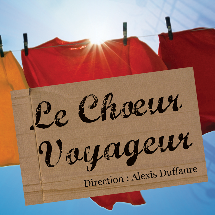 Pochette de l'album éponyme du Chœur Voyageur sorti en 2016.